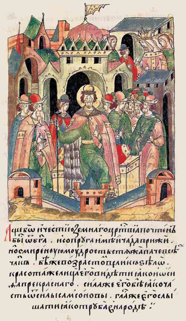 Лицевой летописный свод (том 6 стр. 8) Александр Ярославович "Хотя и получил Александр от Бога честь царствовать на земле, и супругу имел, и детей нажил, но смиренномудрия было у него больше, чем у любого другого человека. Был же роста высокого весьма, красота же лица его была как у Иосифа Прекрасного, сила же его была как часть силы Самсоновой, голос же его был как труба в народе,"